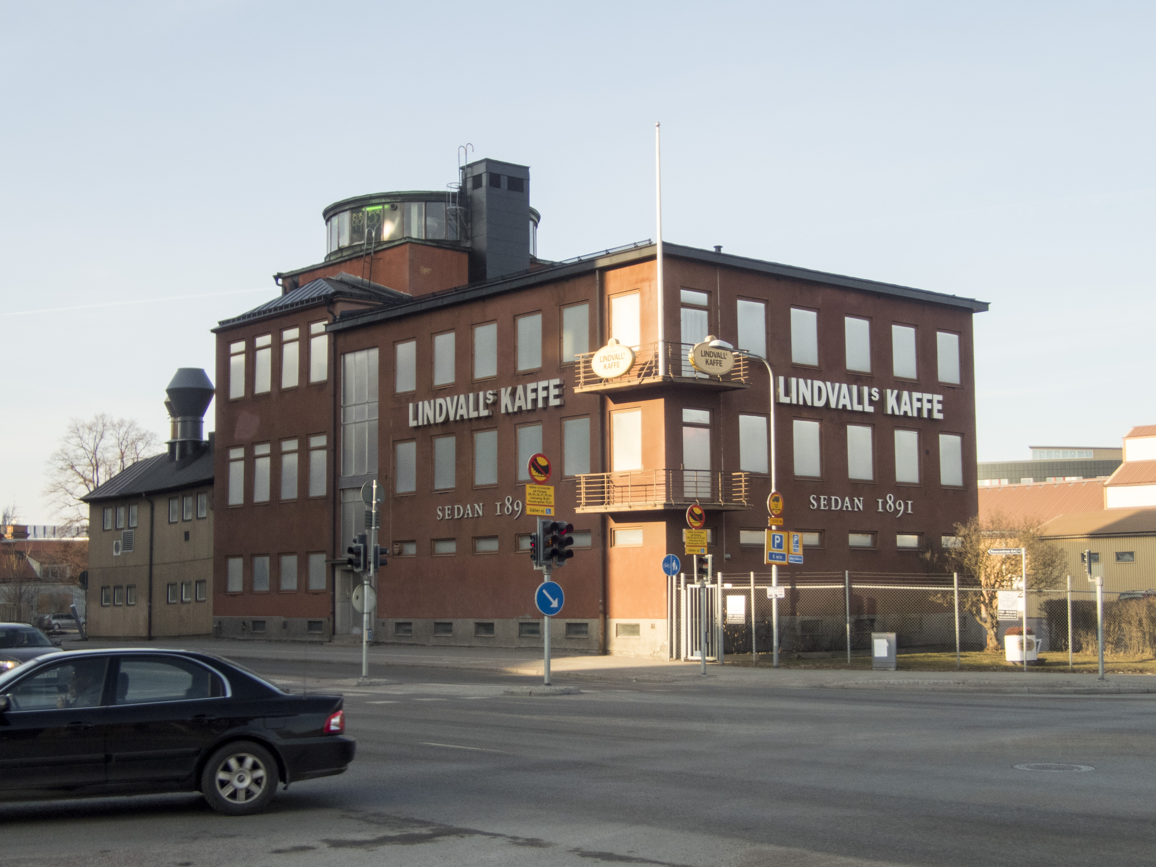 Lindvalls kafferosteri, byggnadsår 1940, arkitekt Per Bolin